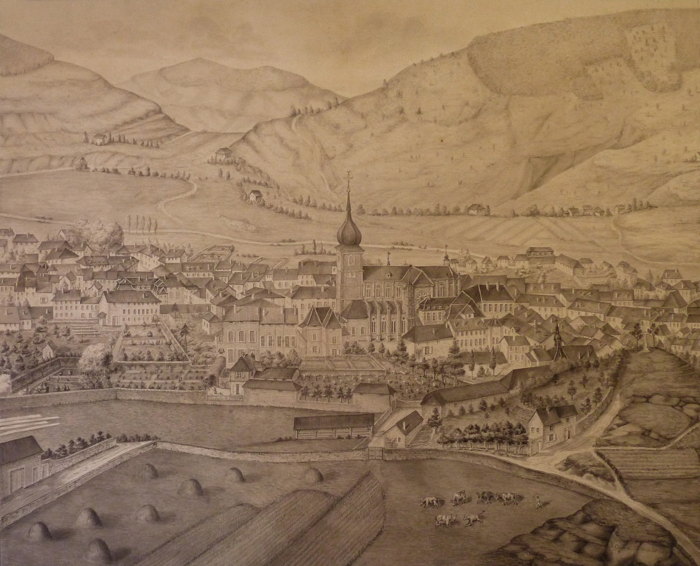 Grégoire, Vue de Remiremont, dessin (encre brune, papier vergé), le 25 juillet 1826. Vue avant la construction de l'école Jules Ferry. On y reconnaît l'ancien cimetière paroissial et l'annexe de l'ancienne maison canoniale, construite en brique (actuel musée Charles Friry)